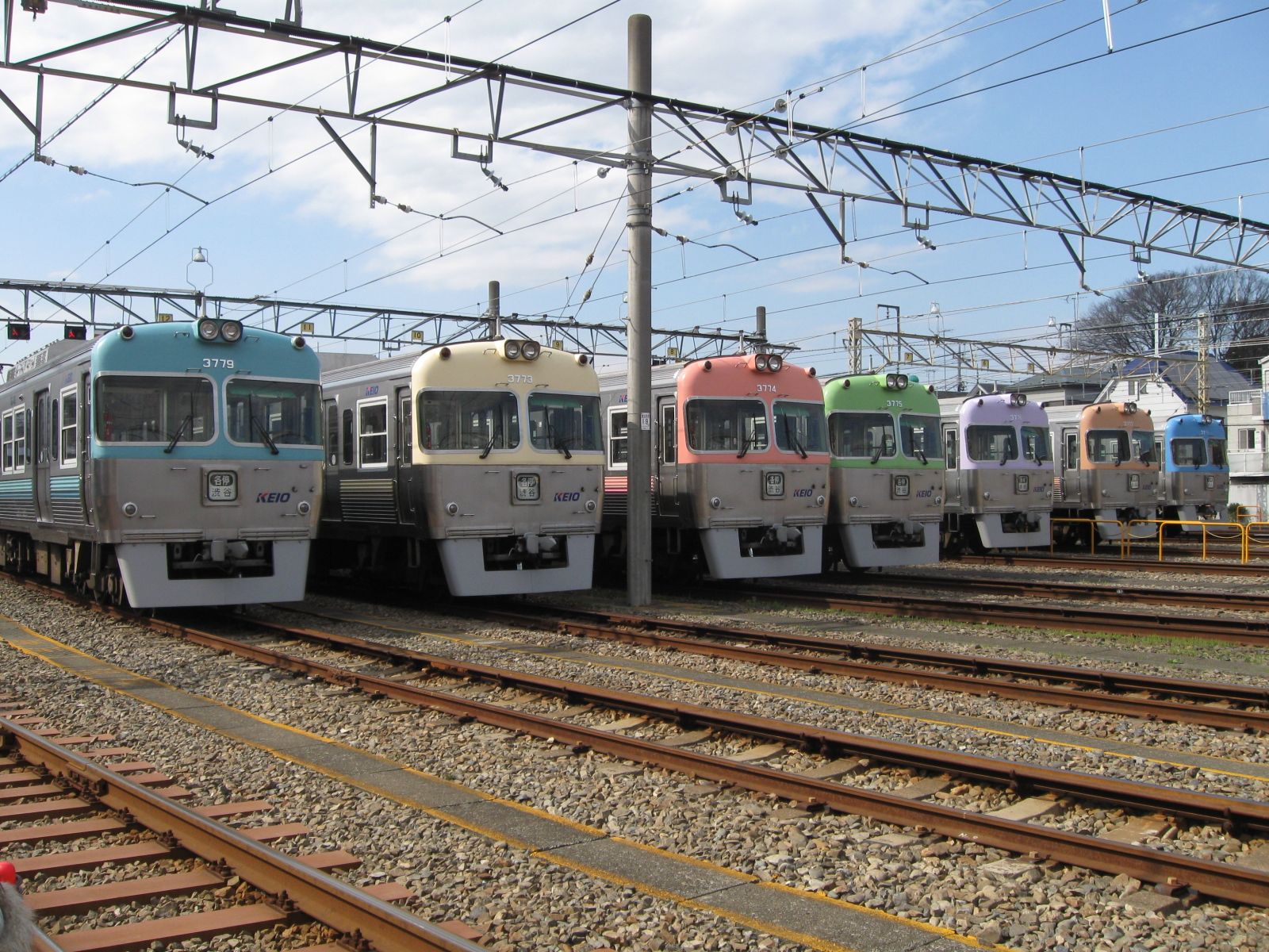 京王電鉄3000系3723～29F